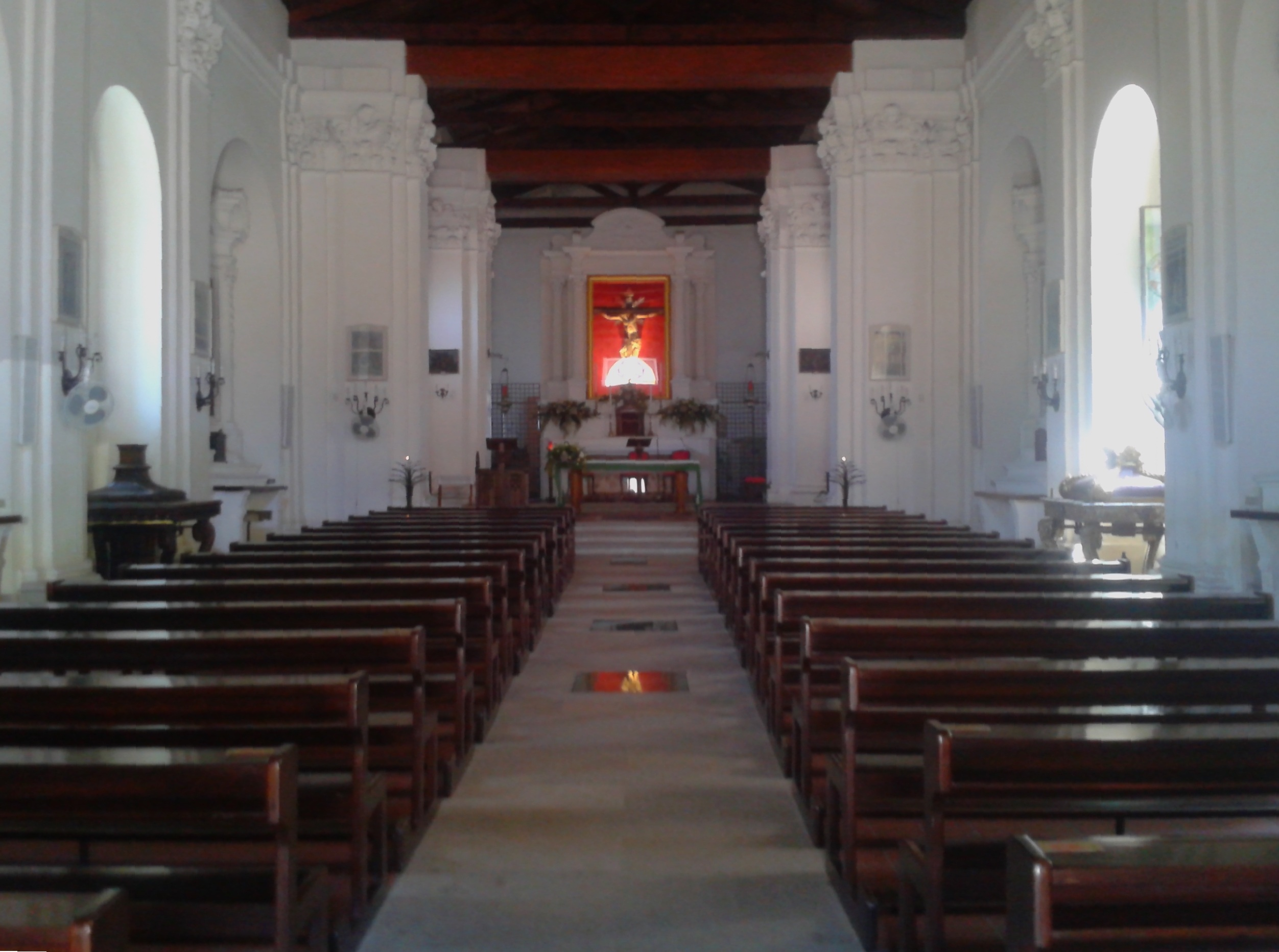 Interno chiesa del Santissimo Crocifisso di Palmi